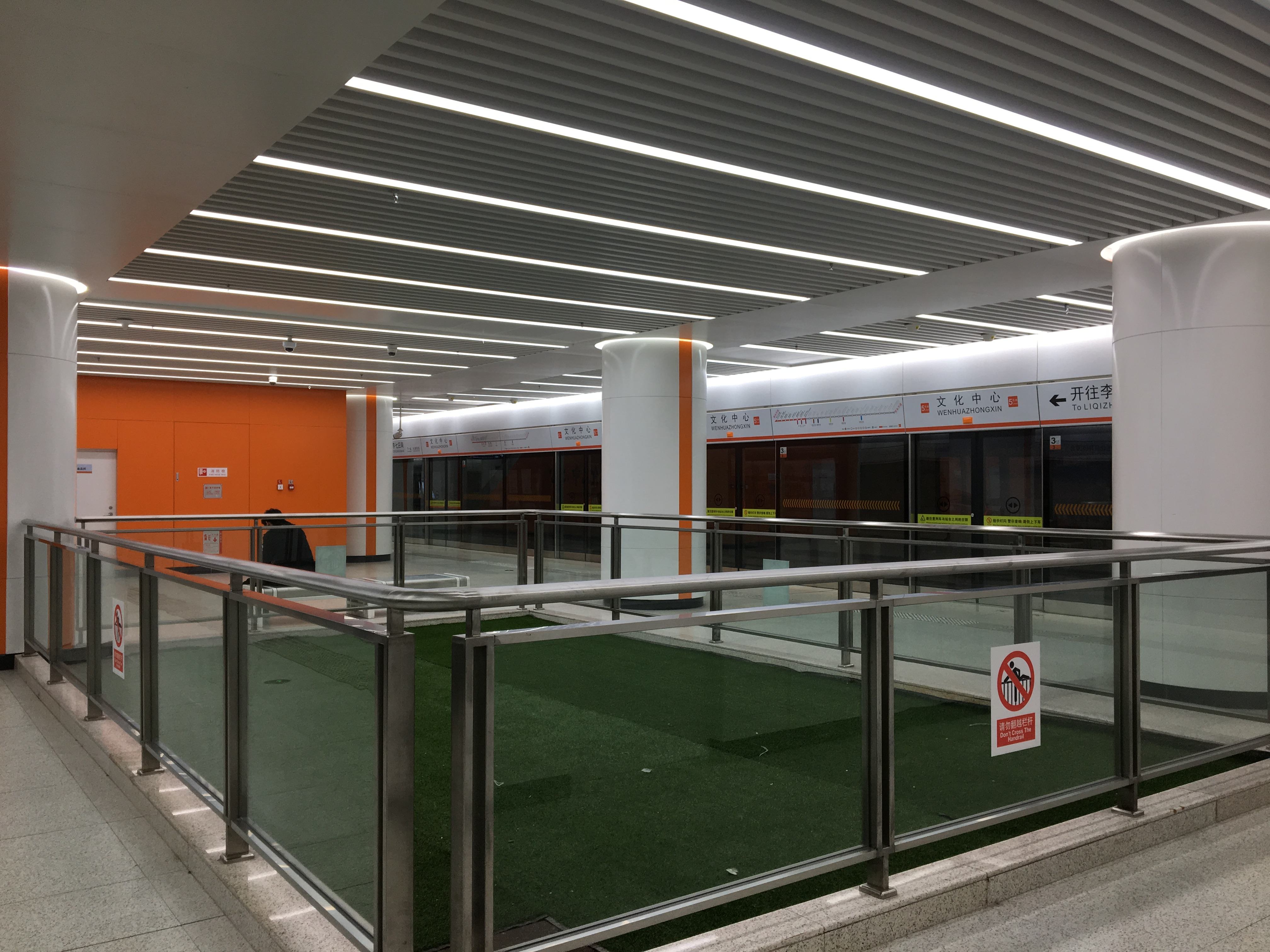 天津地铁5号线文化中心站站台，中部为预留Z1线换乘楼梯